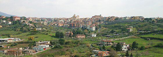 Marino vista da Colle Cimino